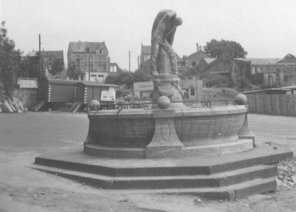 Wittener Kornmarkt mit dem Sackträger-Brunnen im August 1951